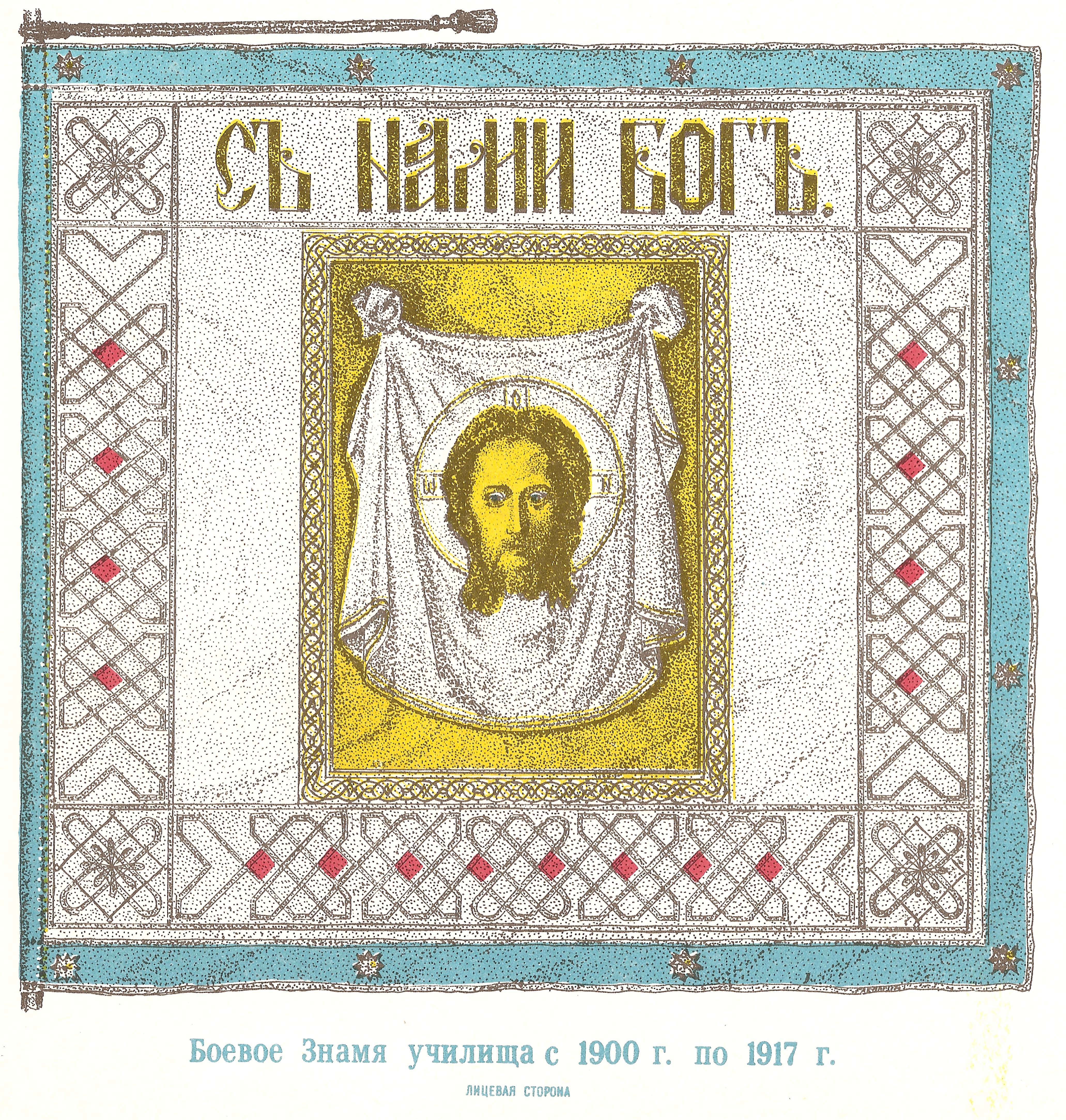 Изображение боевого знамени военно-топографического училища 1900 года.